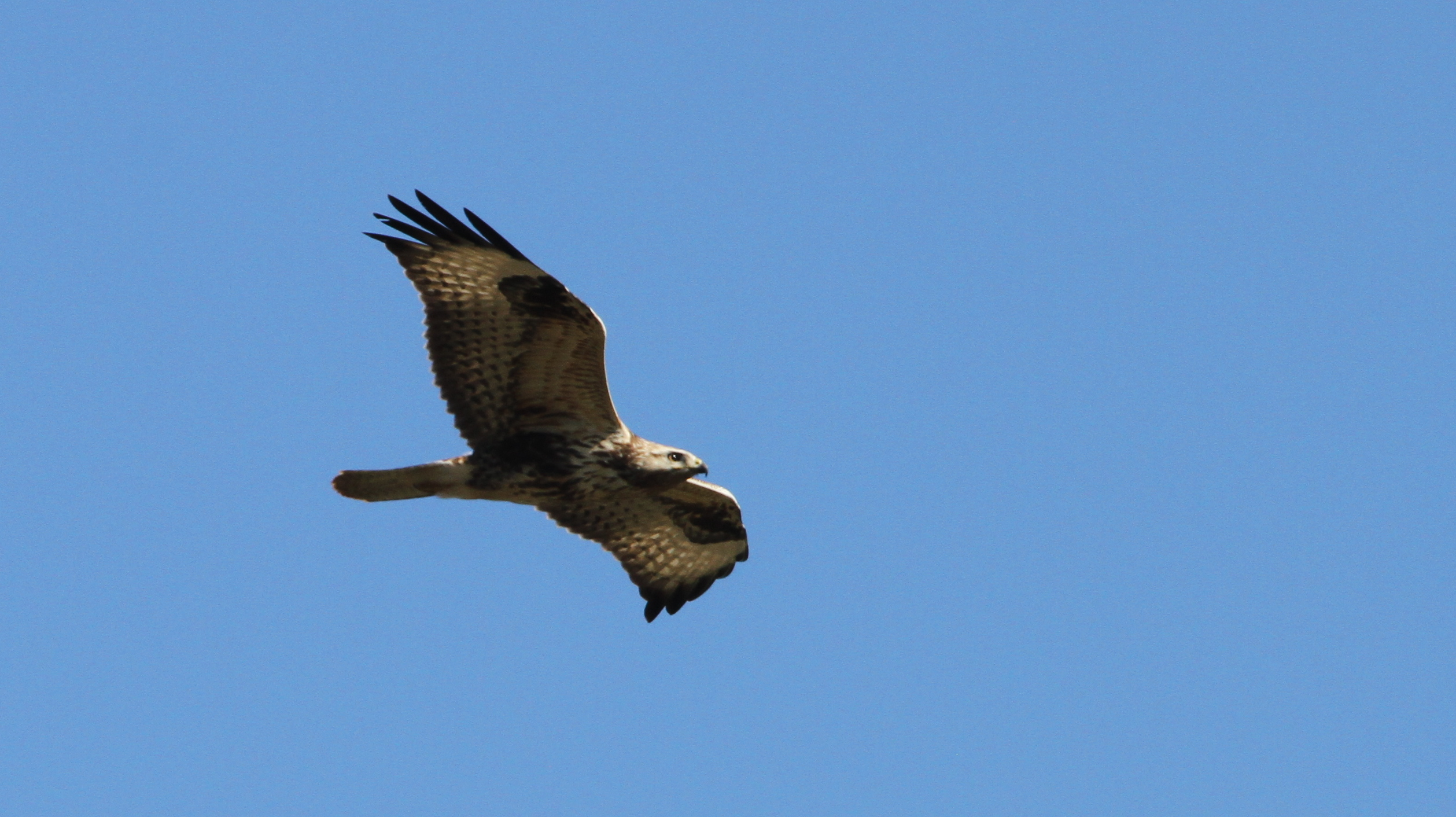 Steppe Buzzard Israel